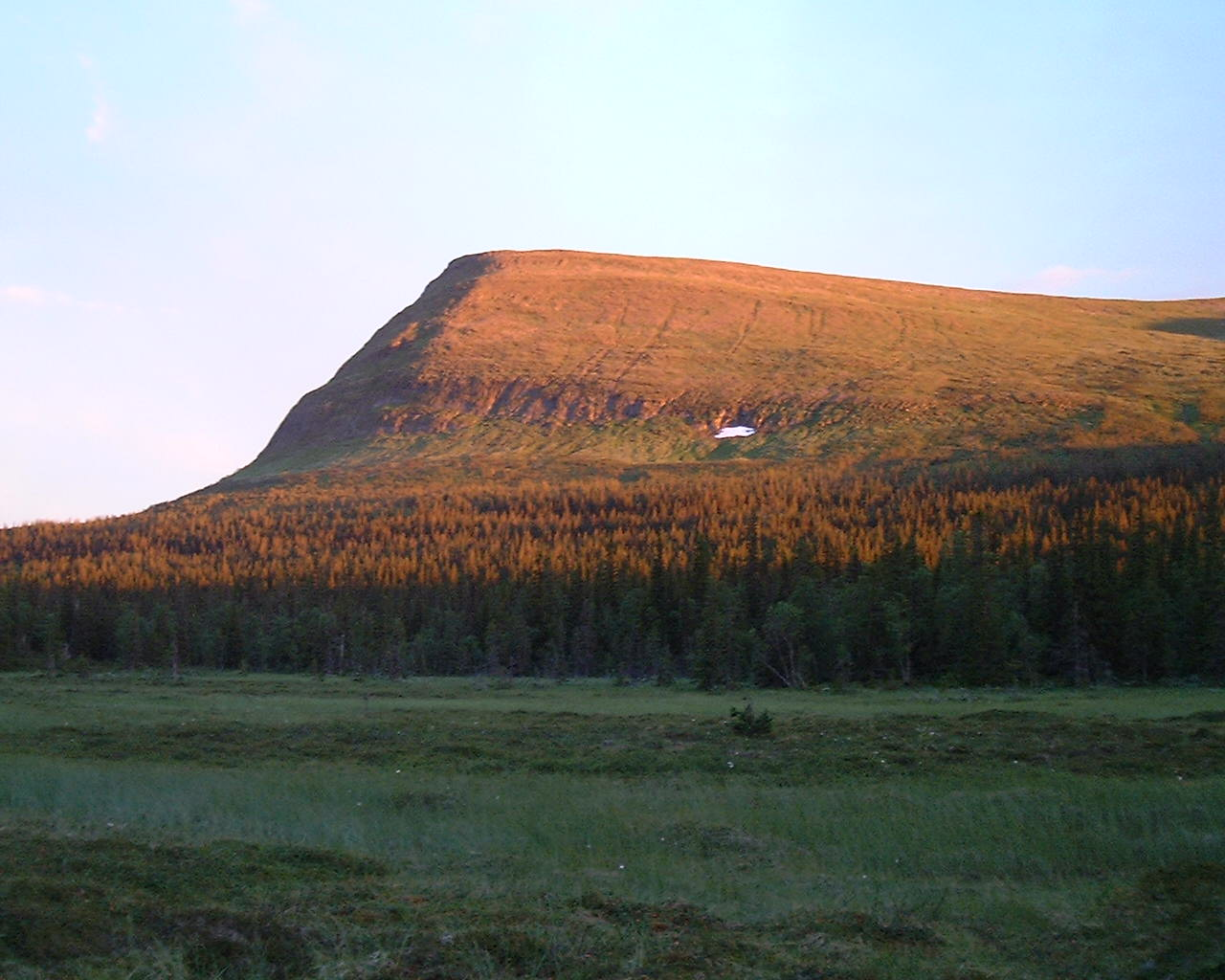 Munsfjället östra topp i Strömsunds kommun i Jämtland